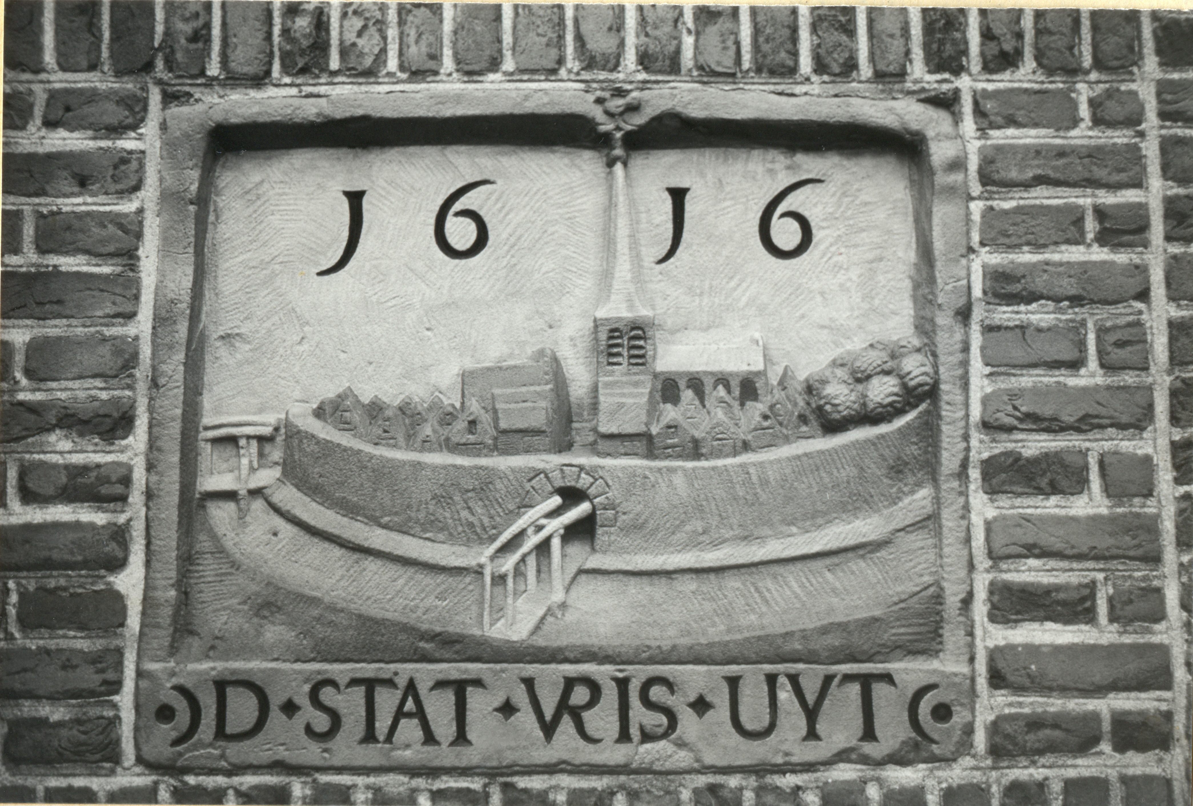 Dit is een gevelsteen met opschrift D STAT VRIS UYT en het jaartal 1616. De gevelsteen stelt een gezicht op het Duitse stadje Friesoythe voor vanuit het zuiden (zie ). De steen bevindt zich in het Klaeuwshofje, Oranje Plantage 58-77, te Delft.